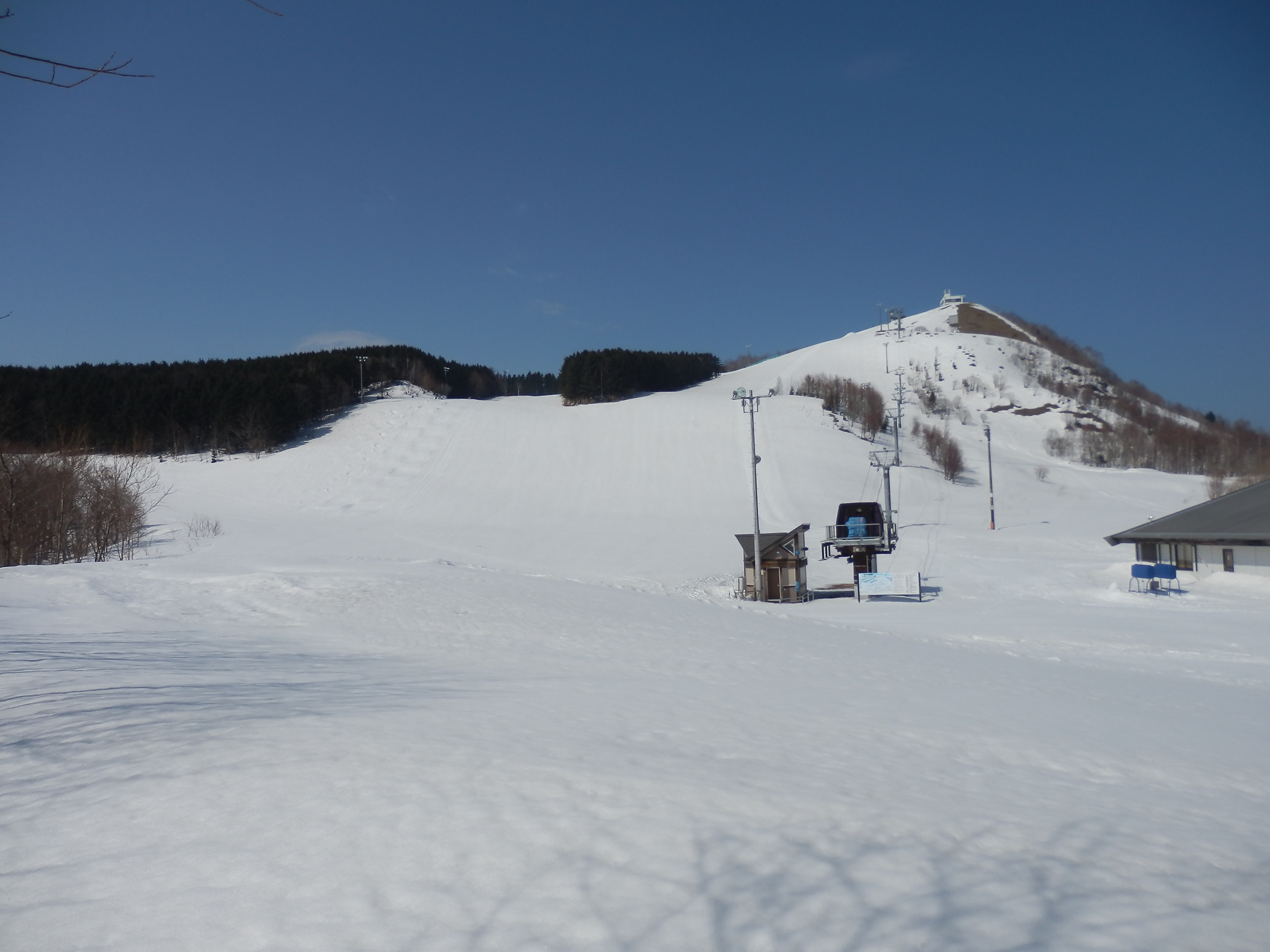 枝幸町国設三笠山スキー場